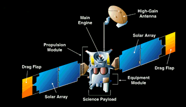 De y ésta de